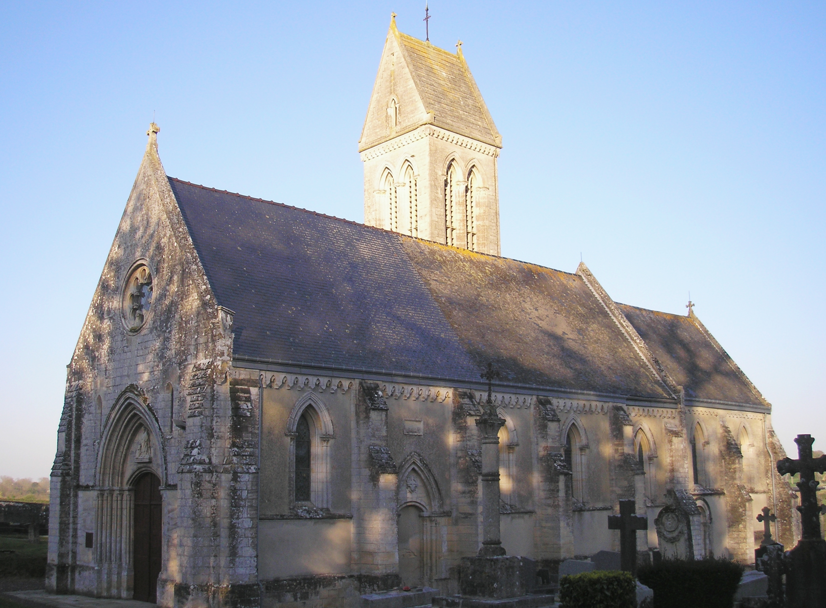 Barbeville (Normandie, France). L'église Saint-Martin.